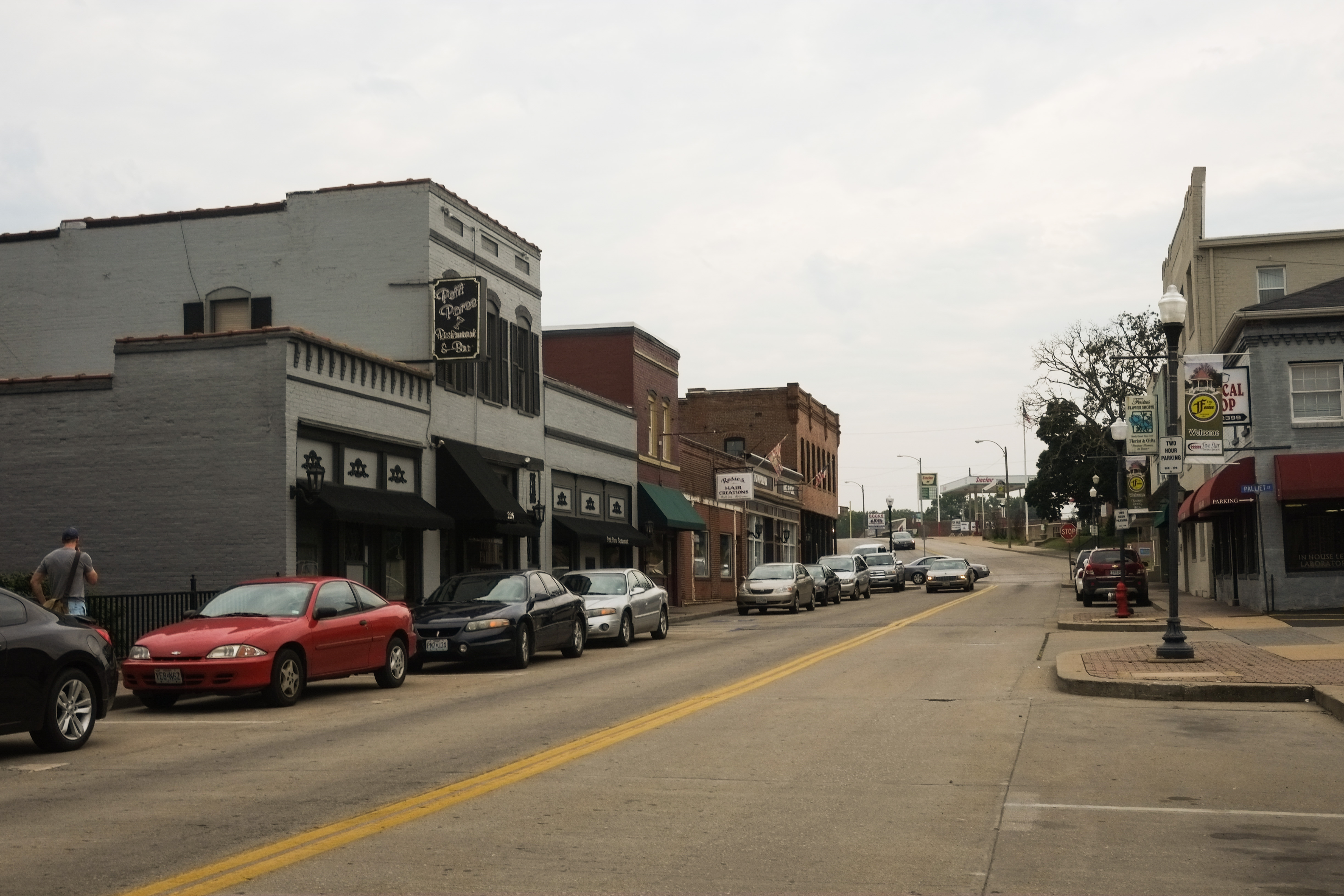 Festus Main Street